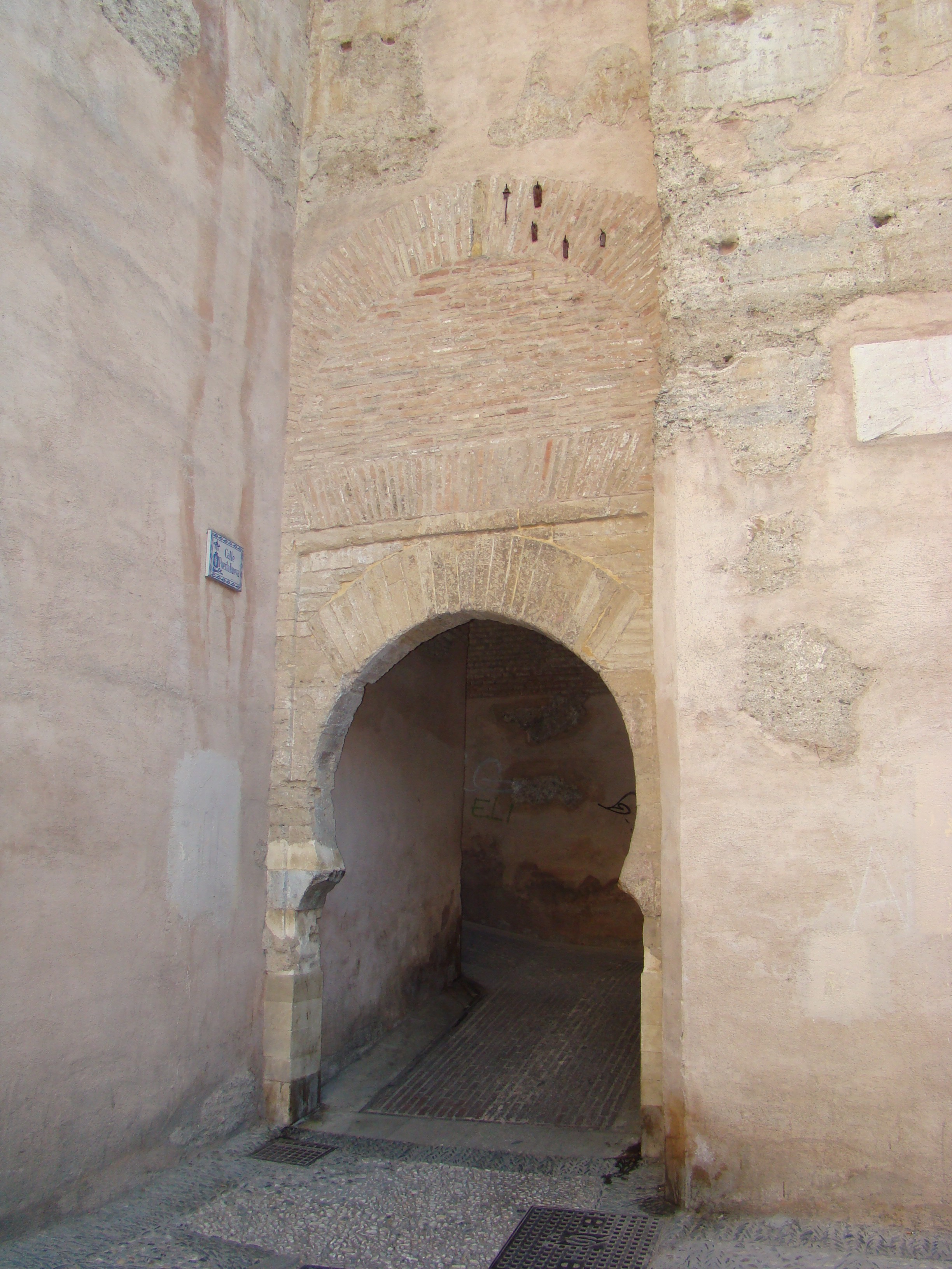 Arco de las Pesas, en el Albaicín (Granada)